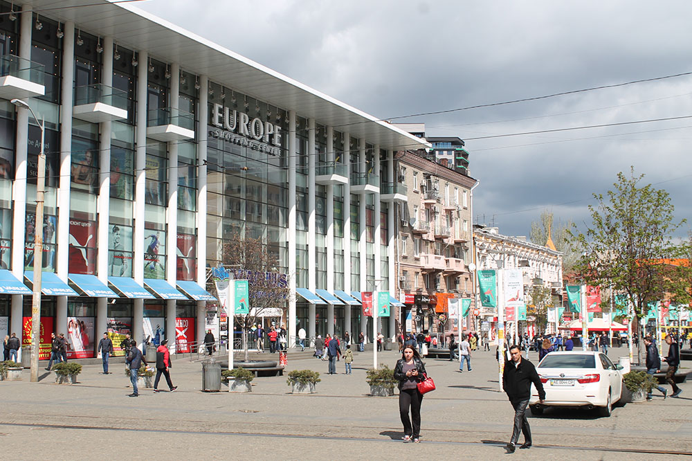 Європейський бульвар у Дніпрі.